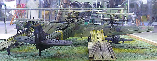 Sweno